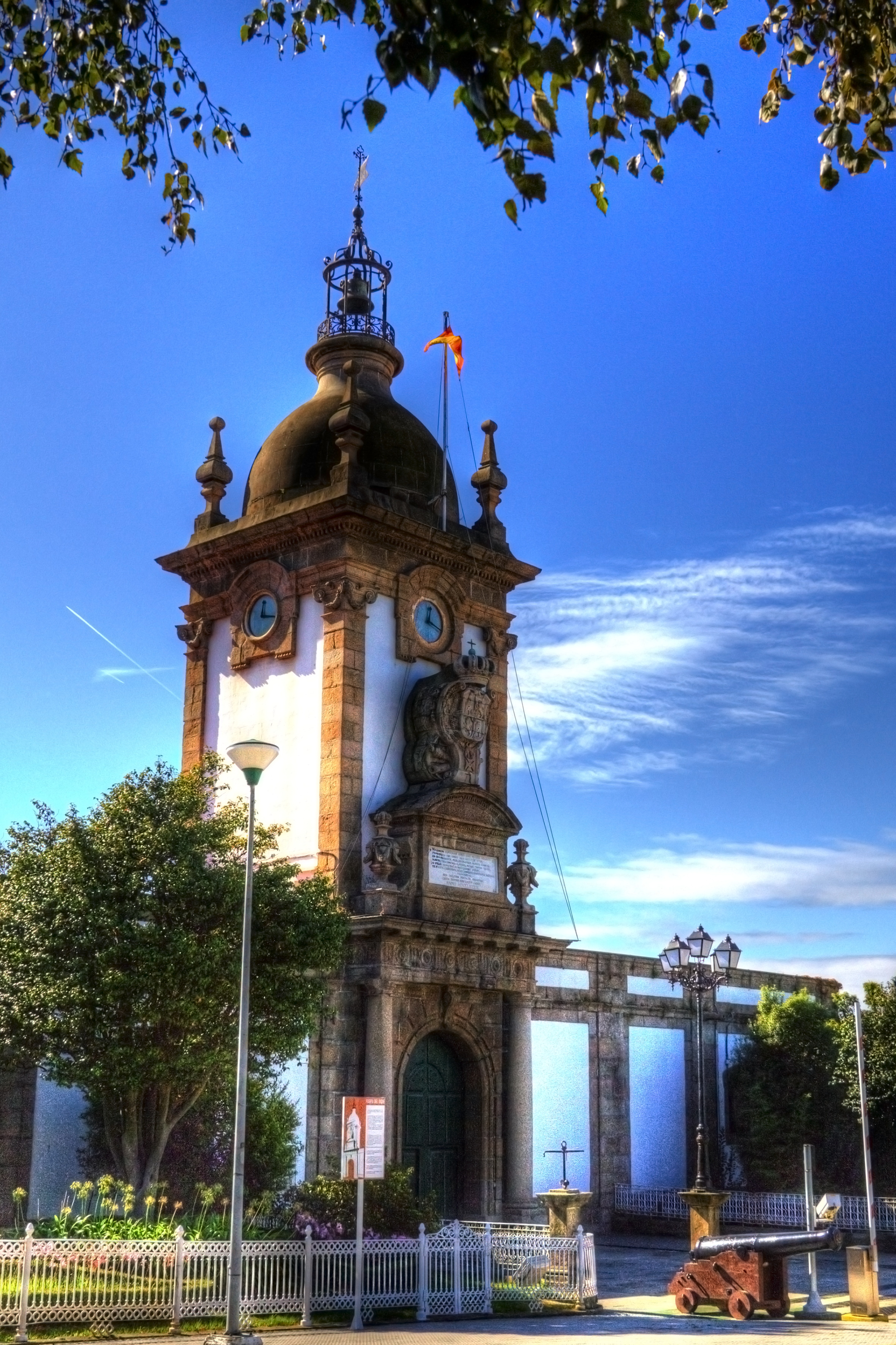 Arsenal de Ferrol, Puerta del Parque